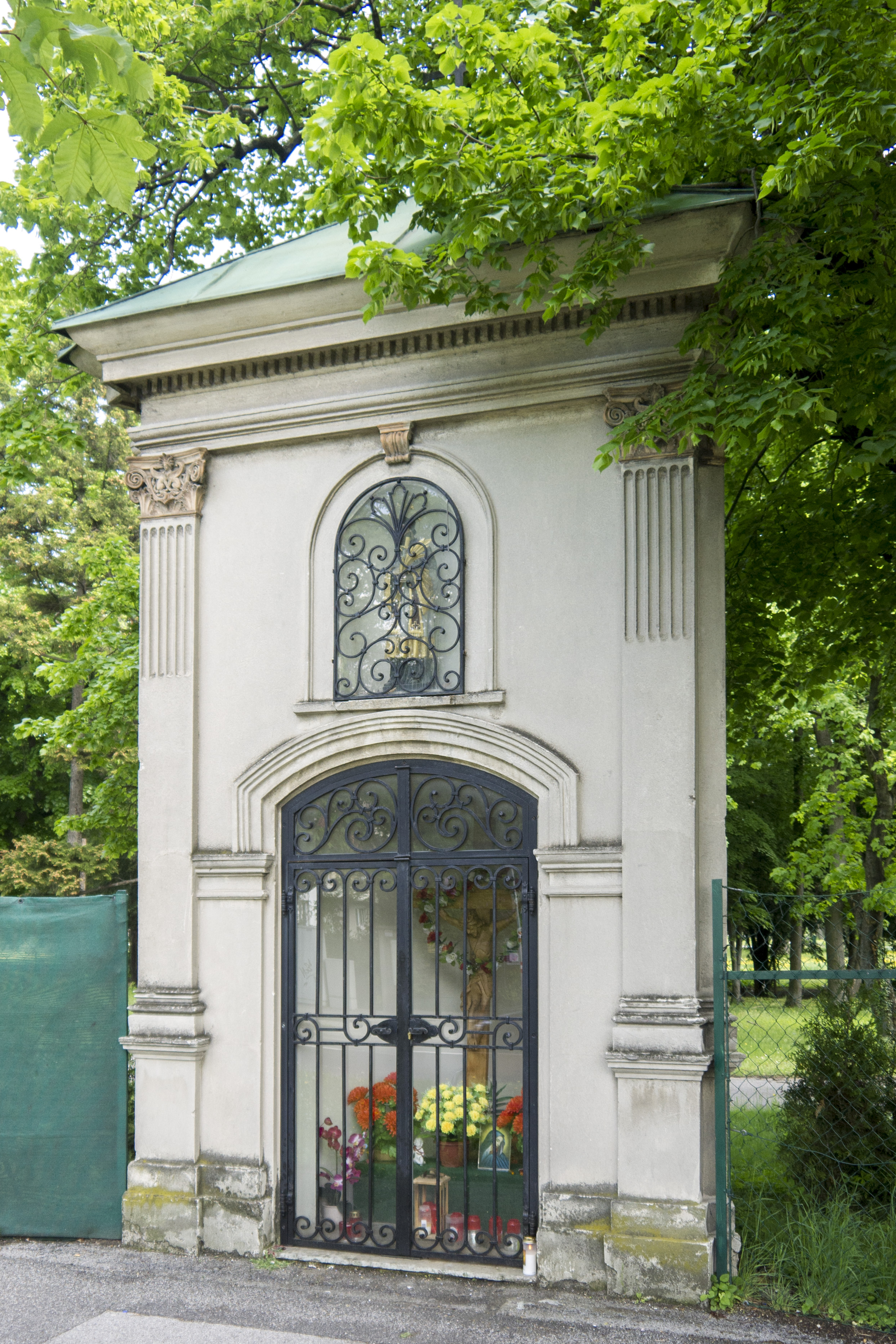 Kandlkapelle